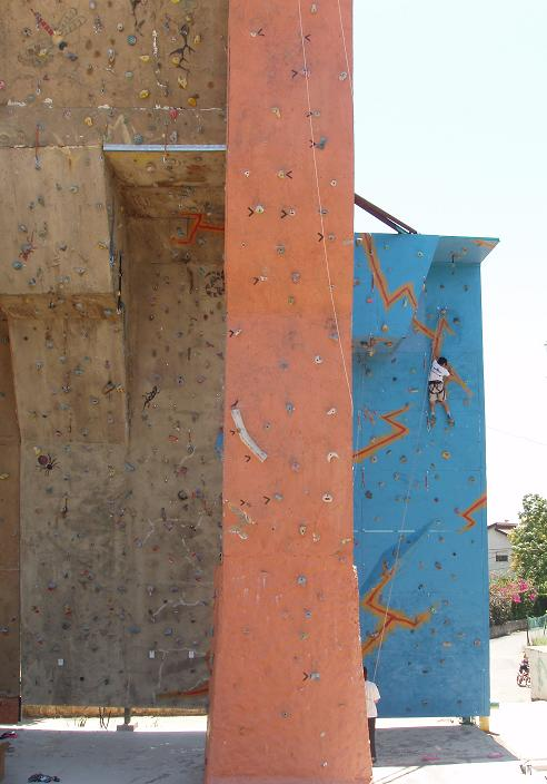 קיר טיפוס ע"ש שגיא בלאו, רמת ישי. צילם דוד שי